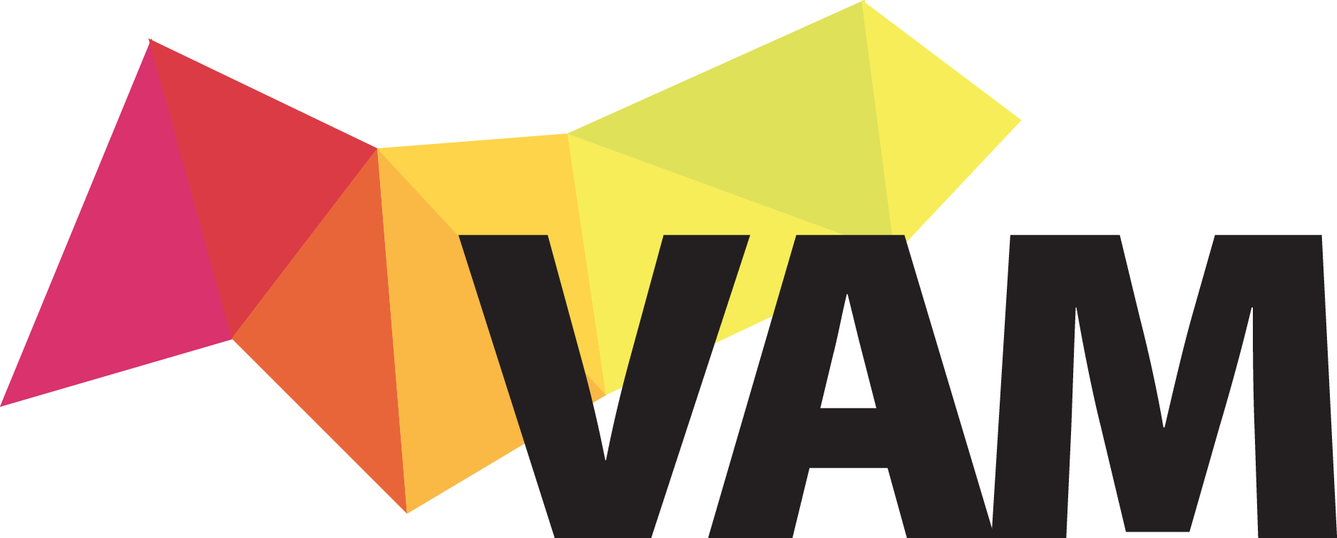 Logo du volet Arts médiatiques